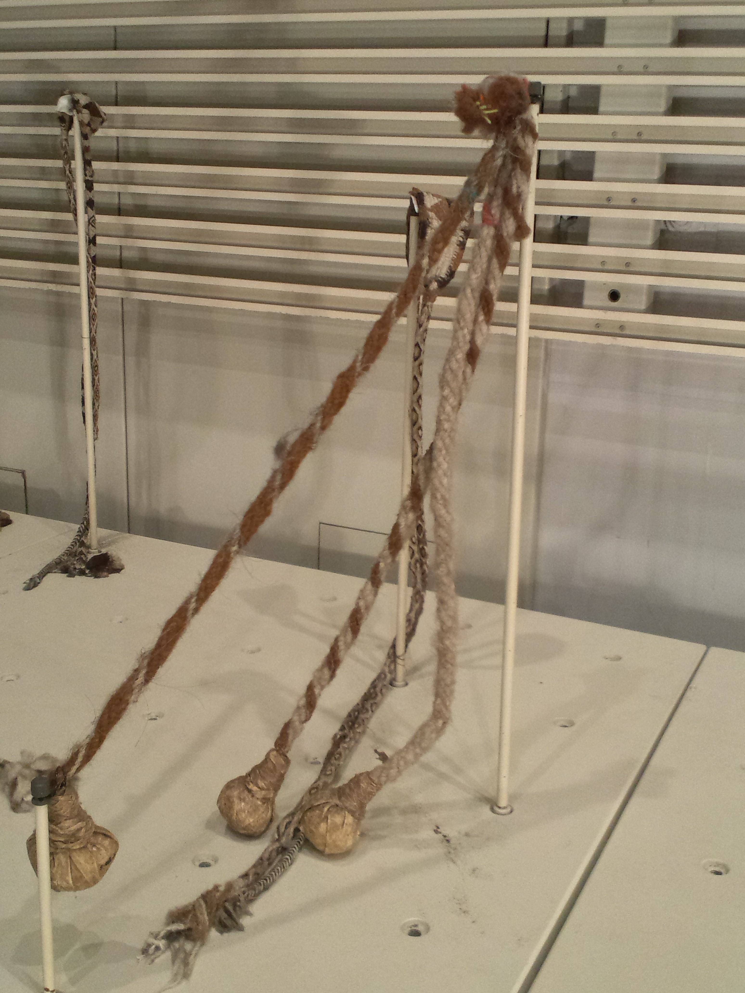 リトルワールド 本館展示室 家畜統制用の投石具（ケチュア族、ペルー）